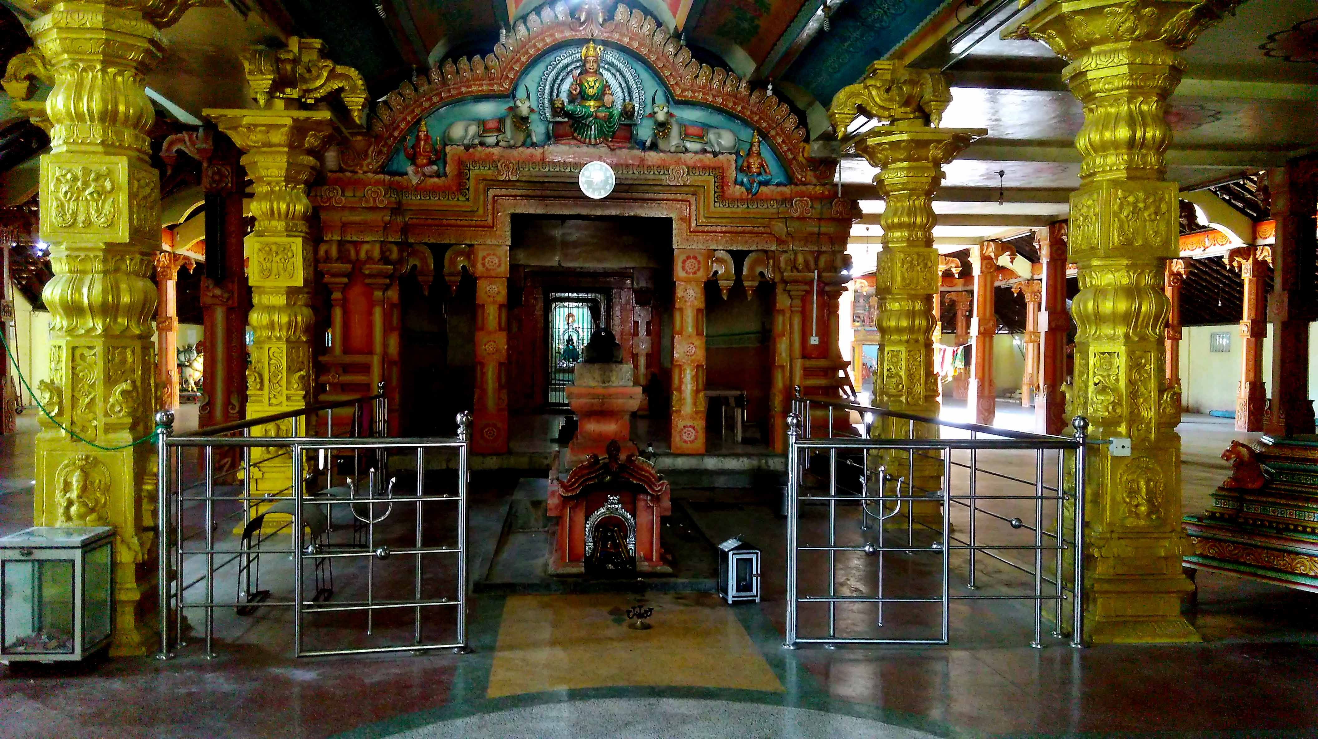 ஆலய மூல விக்கிரக இருப்பிடம்